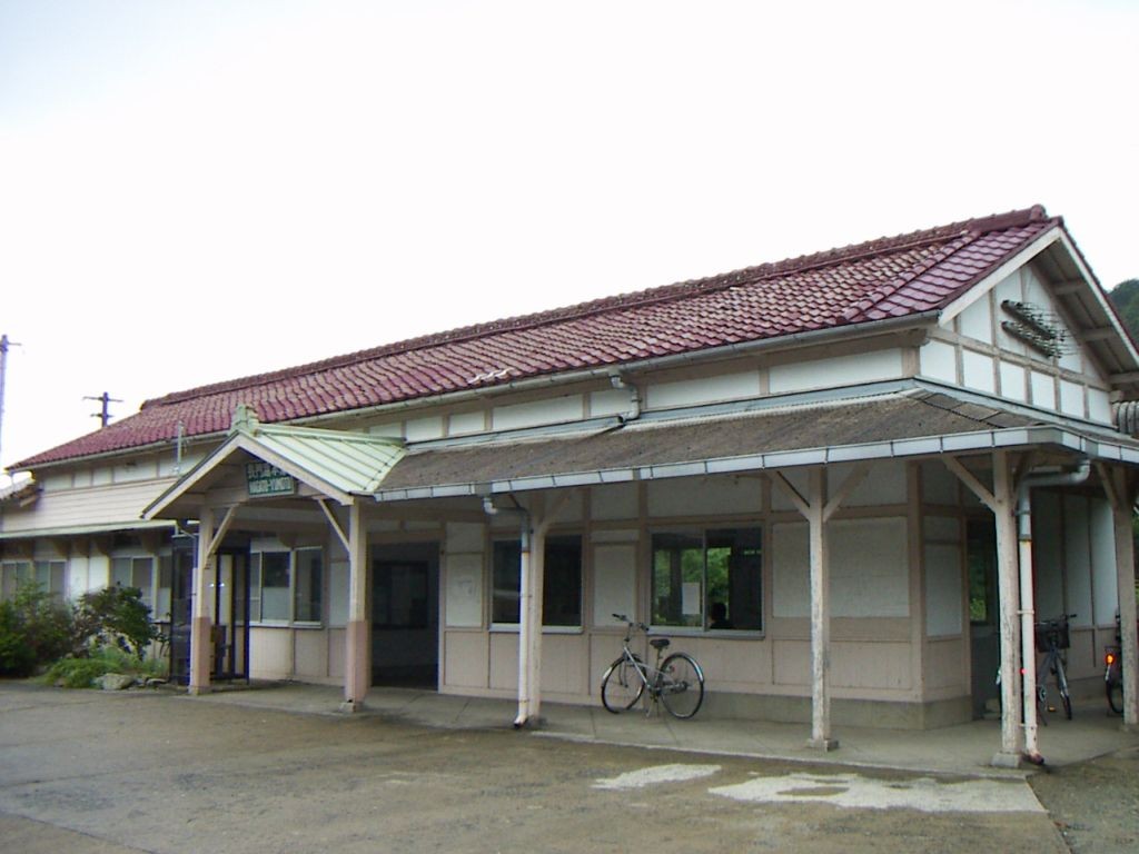 長門湯本駅舎(2005.08.24に投稿者が撮影) Category:西日本旅客鉄道の鉄道駅画像 Category:長門市の画像